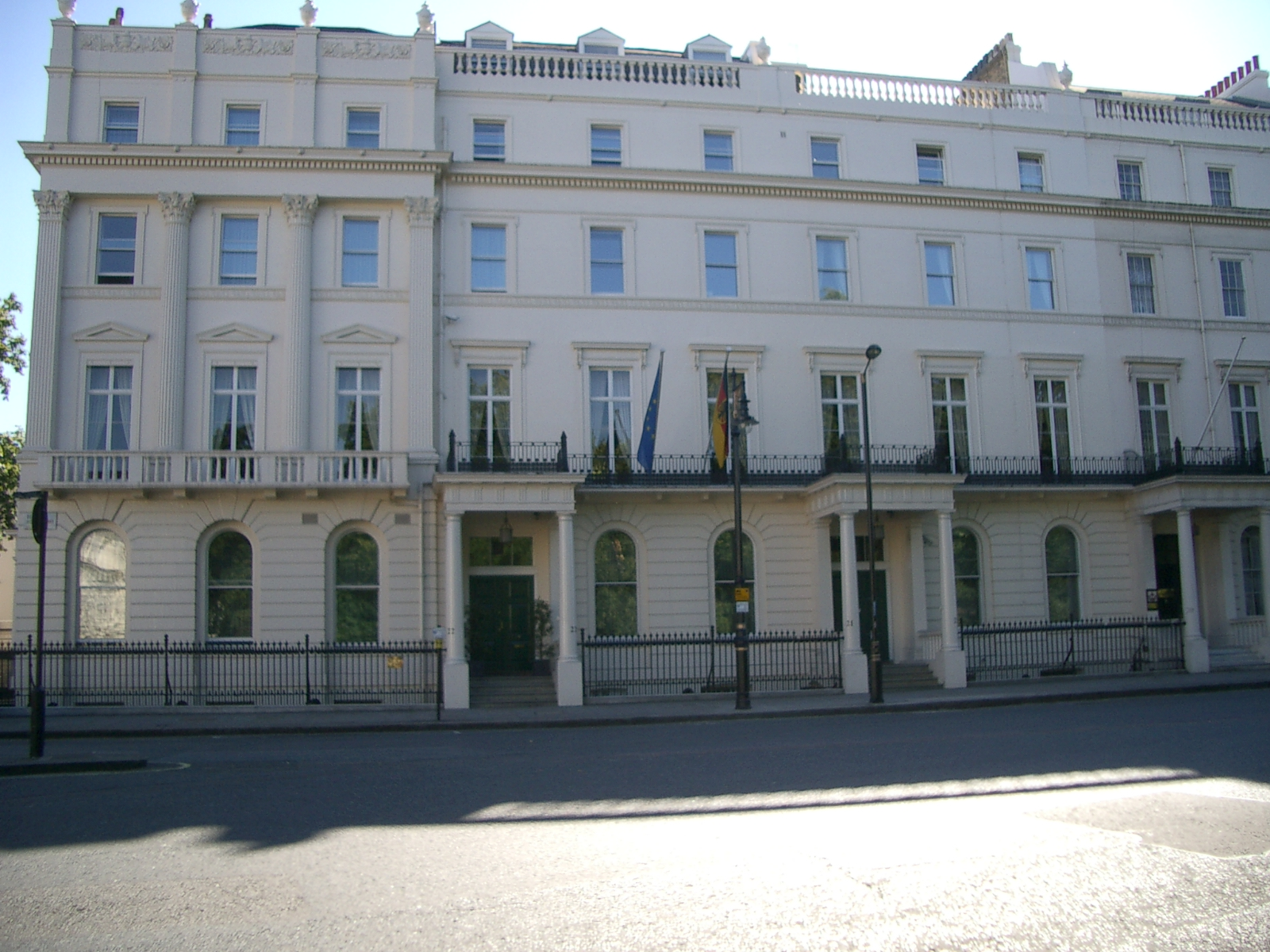 German Embassy London